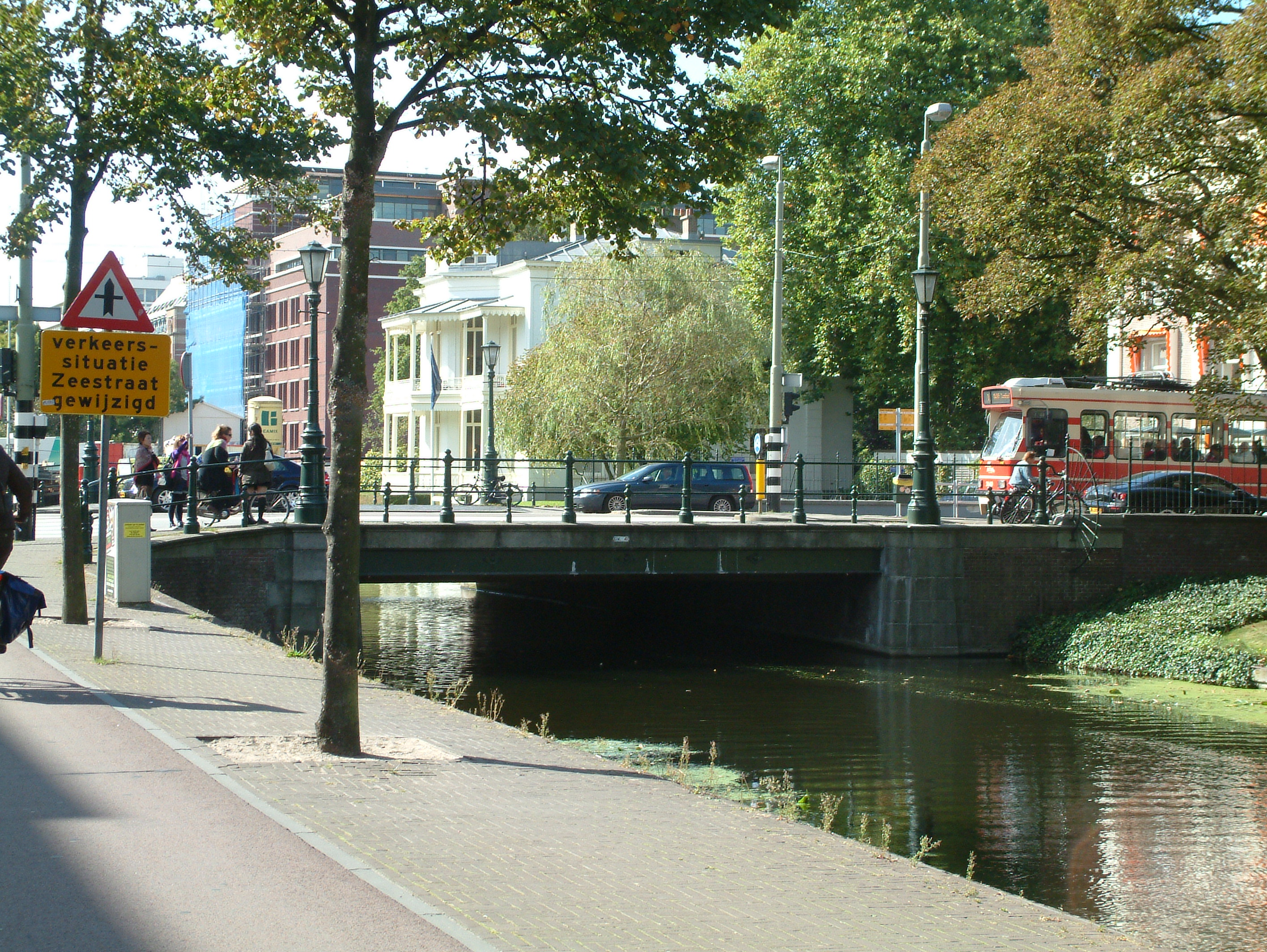 Brug in Den Haag